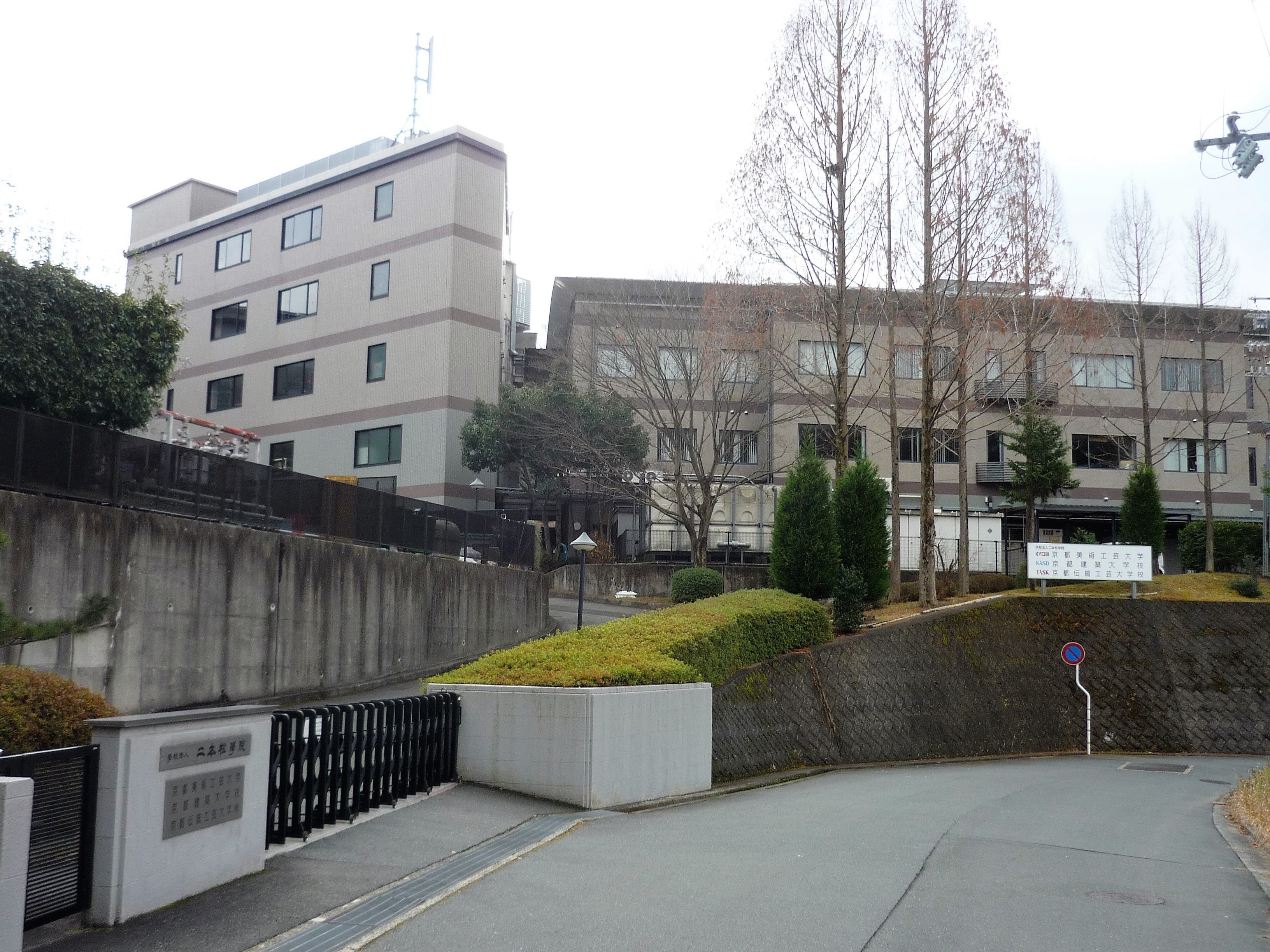 京都美術工芸大学京都園部キャンパス、京都建築大学校、京都伝統工芸大学校